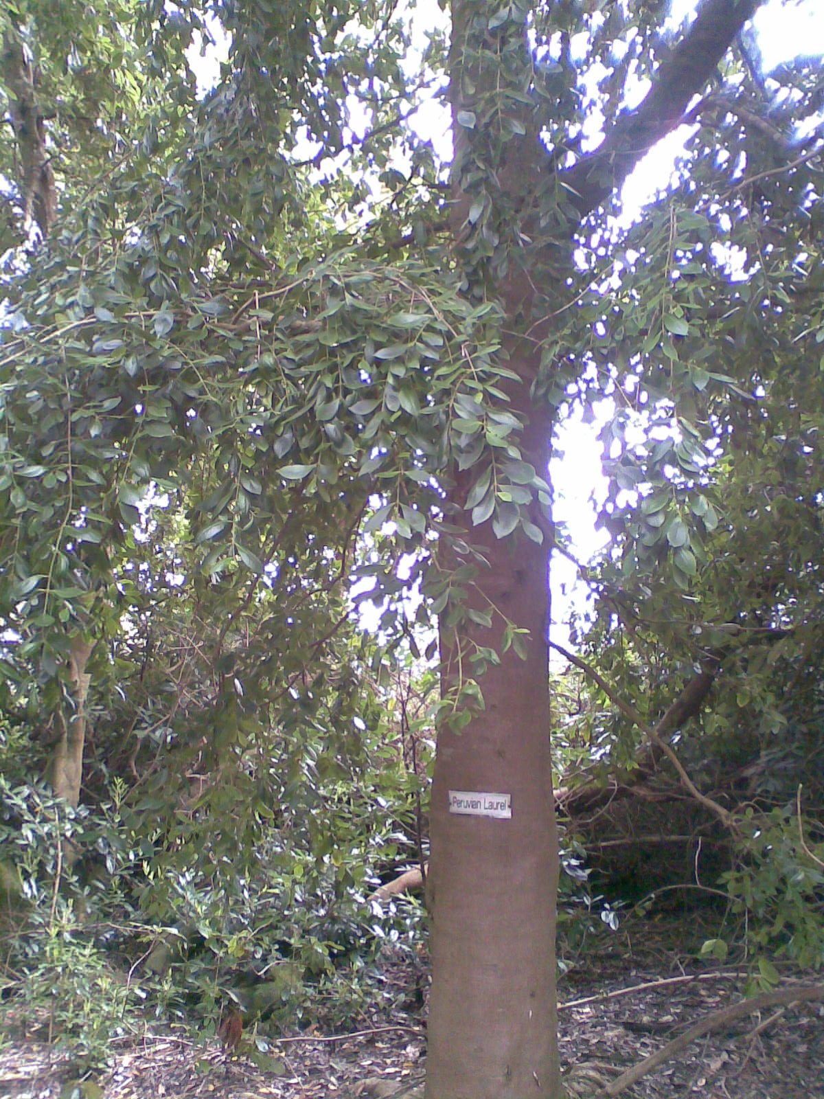 Laurelia sempervirens at Enys Gardens, Cornwall, UK